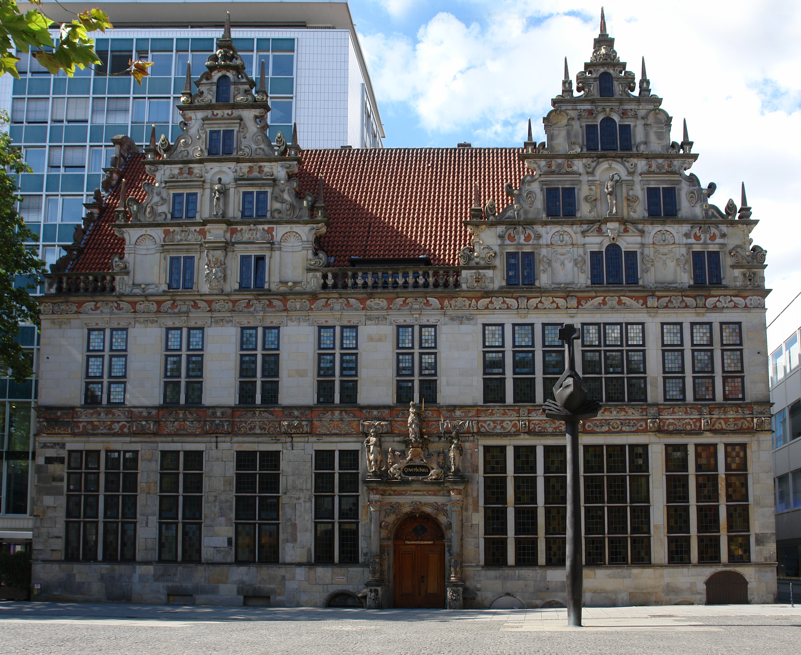 Gewerbehaus am Ansgarikirchhof 24 in Bremen (17. Jh.). Sitz der Handwerkskammer. Das abgebildete Objekt ist ein geschütztes Kulturdenkmal in der Freien Hansestadt Bremen, mit der Nr. 0086 beim Landesamt für Denkmalpflege registriert.